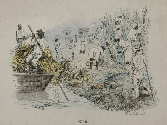 Litho. Ingekleurde litho door Petit naar een tekening van Théodore Bray (no. 12/25). Voorstelling van het oogsten van suikerriet op een slavenplantage. Rechts een 'blankofficier', de Europese opzichter. Links op de voorgrond een zogenoemde pondo, een vaartuig met platte bodem waarmee het riet naar de plantage werd vervoerd.. Ingekleurde litho voorstellende de oogst op een suikerrietplantage